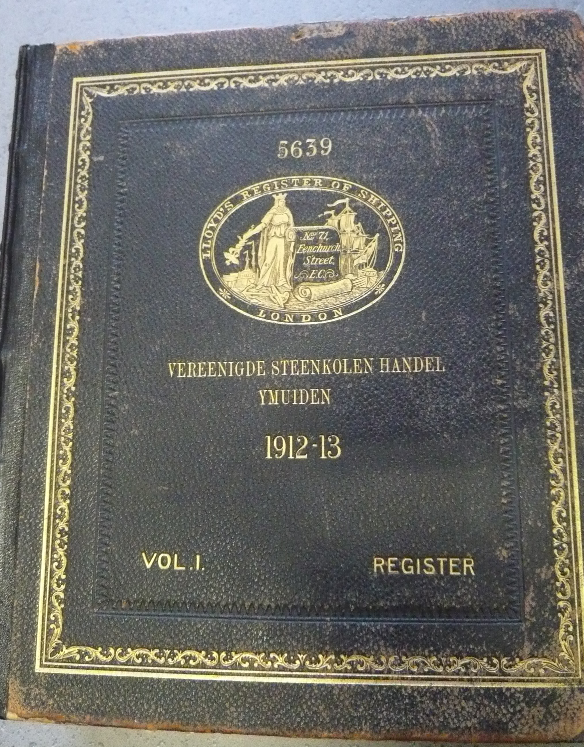 IJmuider Zee- en Havenmuseum 'de Visserijschool', Havenkade 55, IJmuiden Vereenigde Steenkolen Handel Ymuiden - Lloyds Register of Shipping 1912-1913